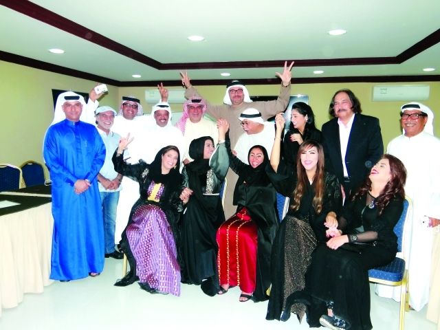 TV serial by Emirates Pictures 2015